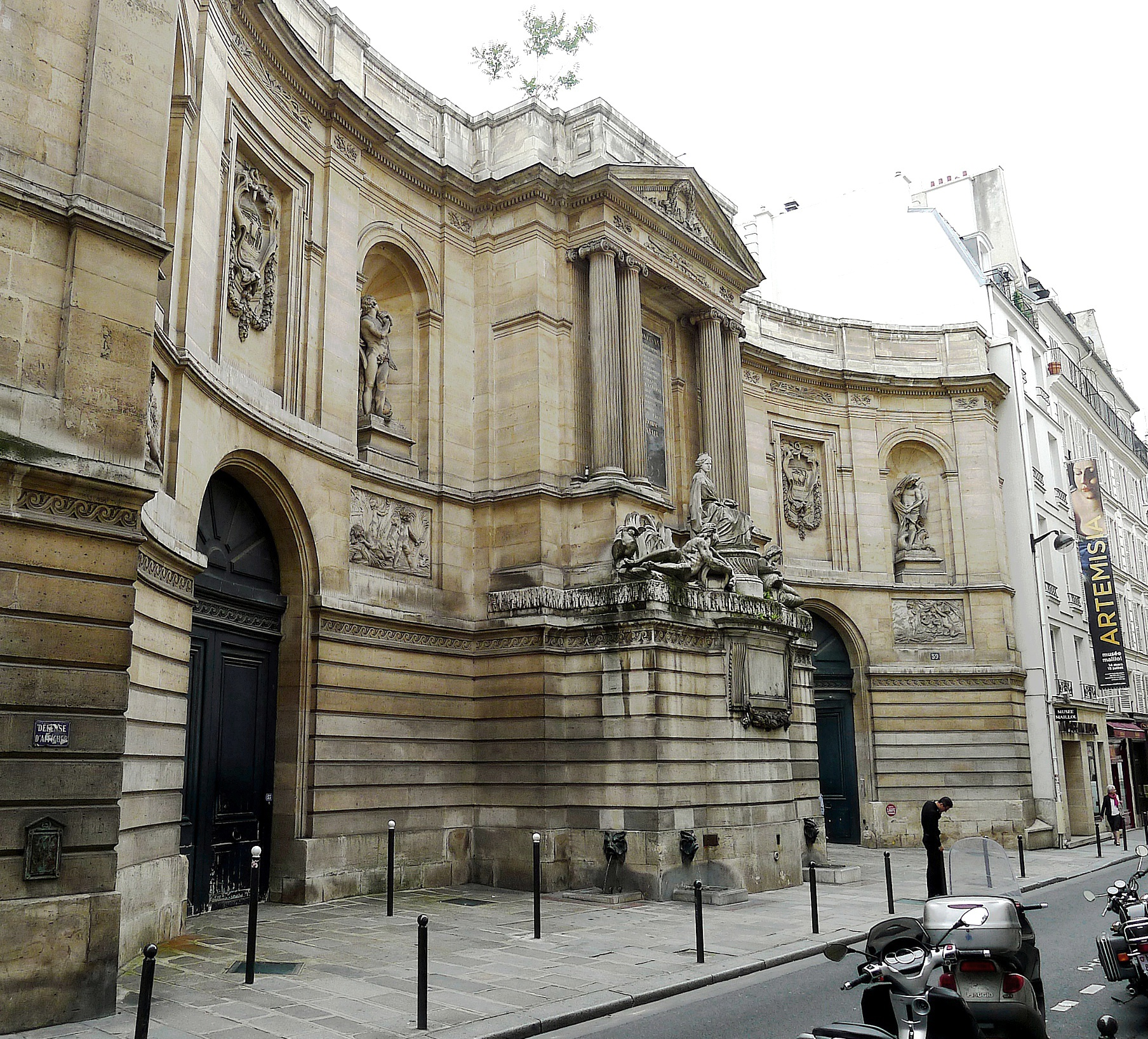 Rue de Grenelle (n°57, 59), fontaine des Quatre-Saisons - Paris VII